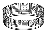 Corona muralis (Mauerkrone)